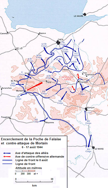 Plan de la Poche de falaise (August 6-17 1944)